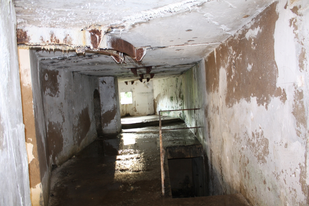 Rechter Geschützraum der Kasematte Bourges in der Ouvrage de Froideterre